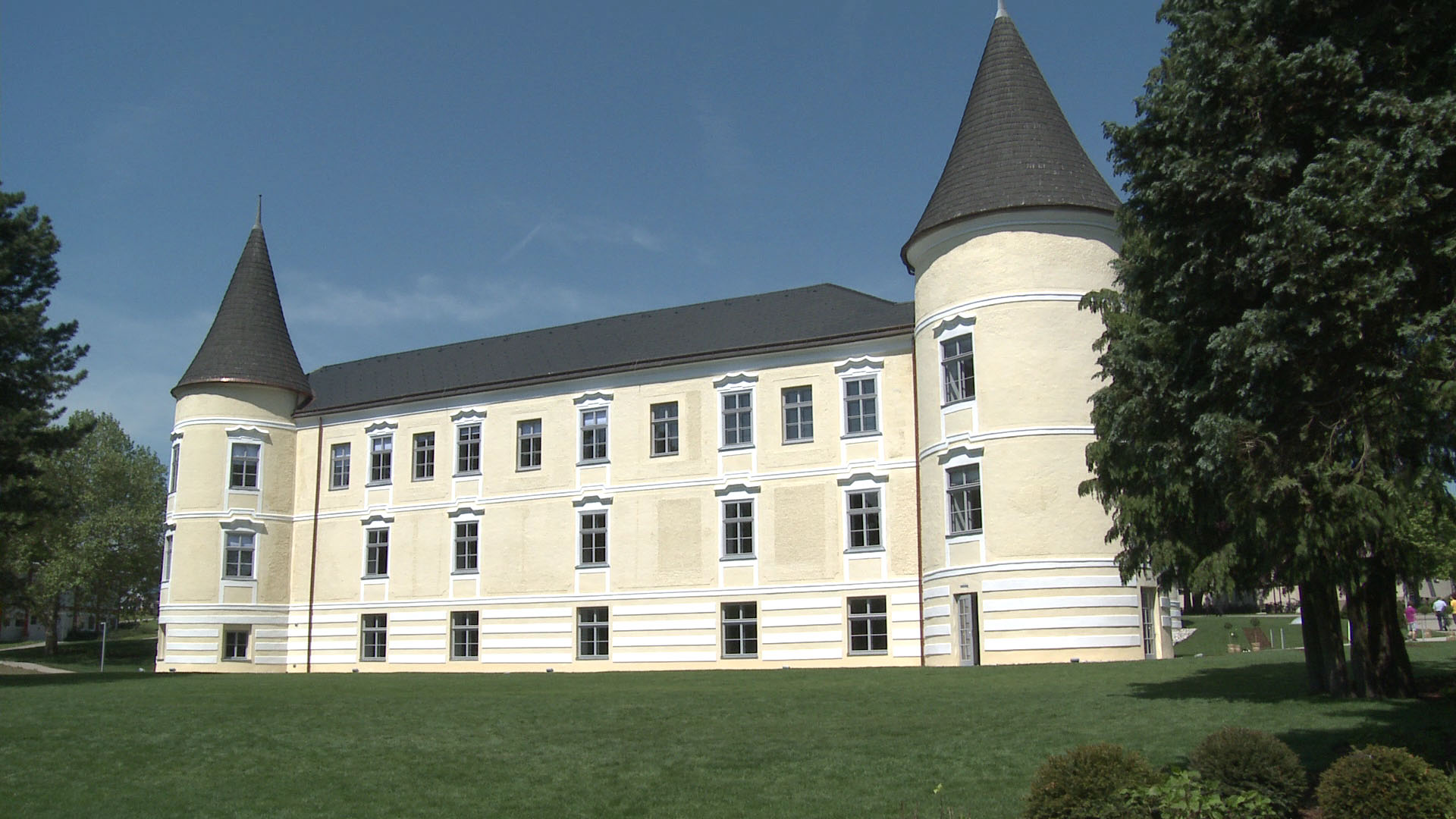 Schloss Weinzierl - Ansicht von Süden